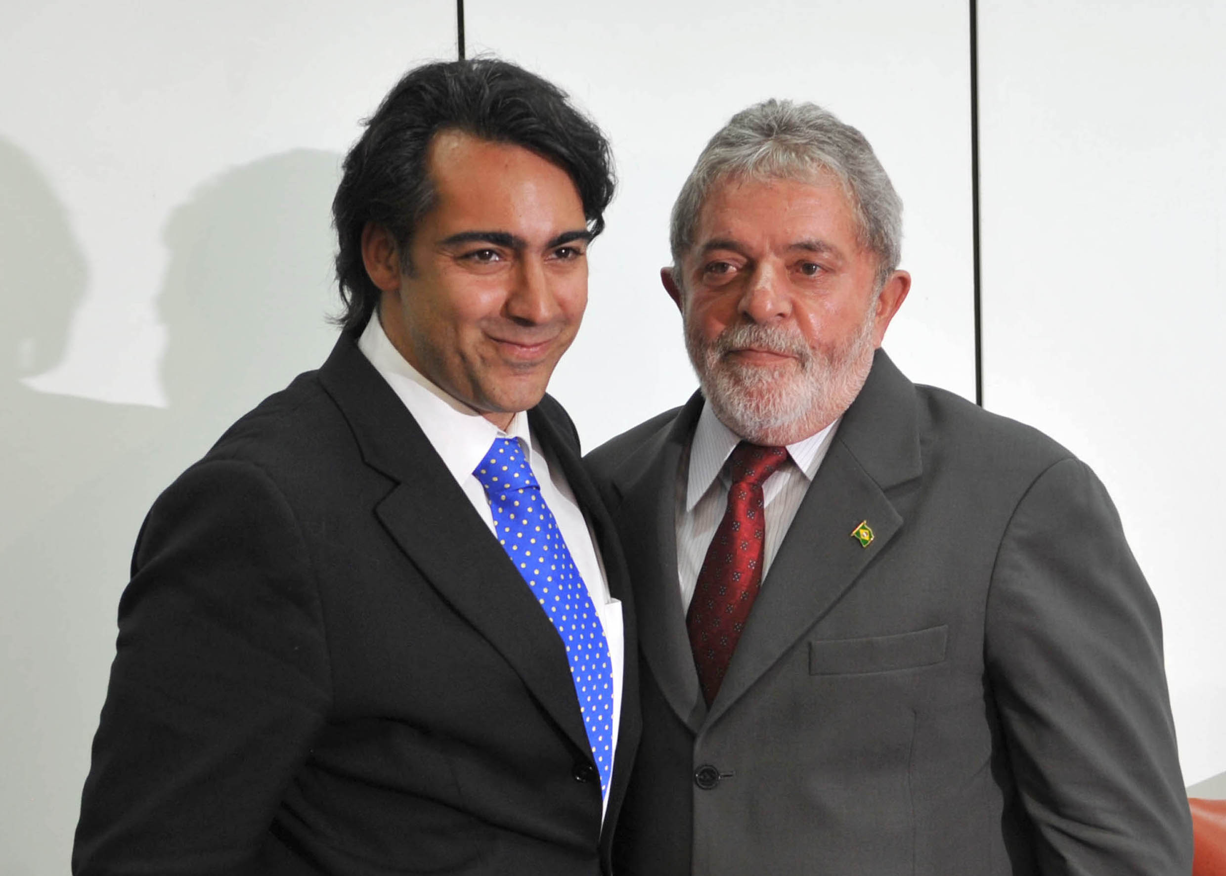 Brasília - Presidente Lula recebe em audiência o candidato independente à Presidência do Chile, Marco-Enríquez Ominami